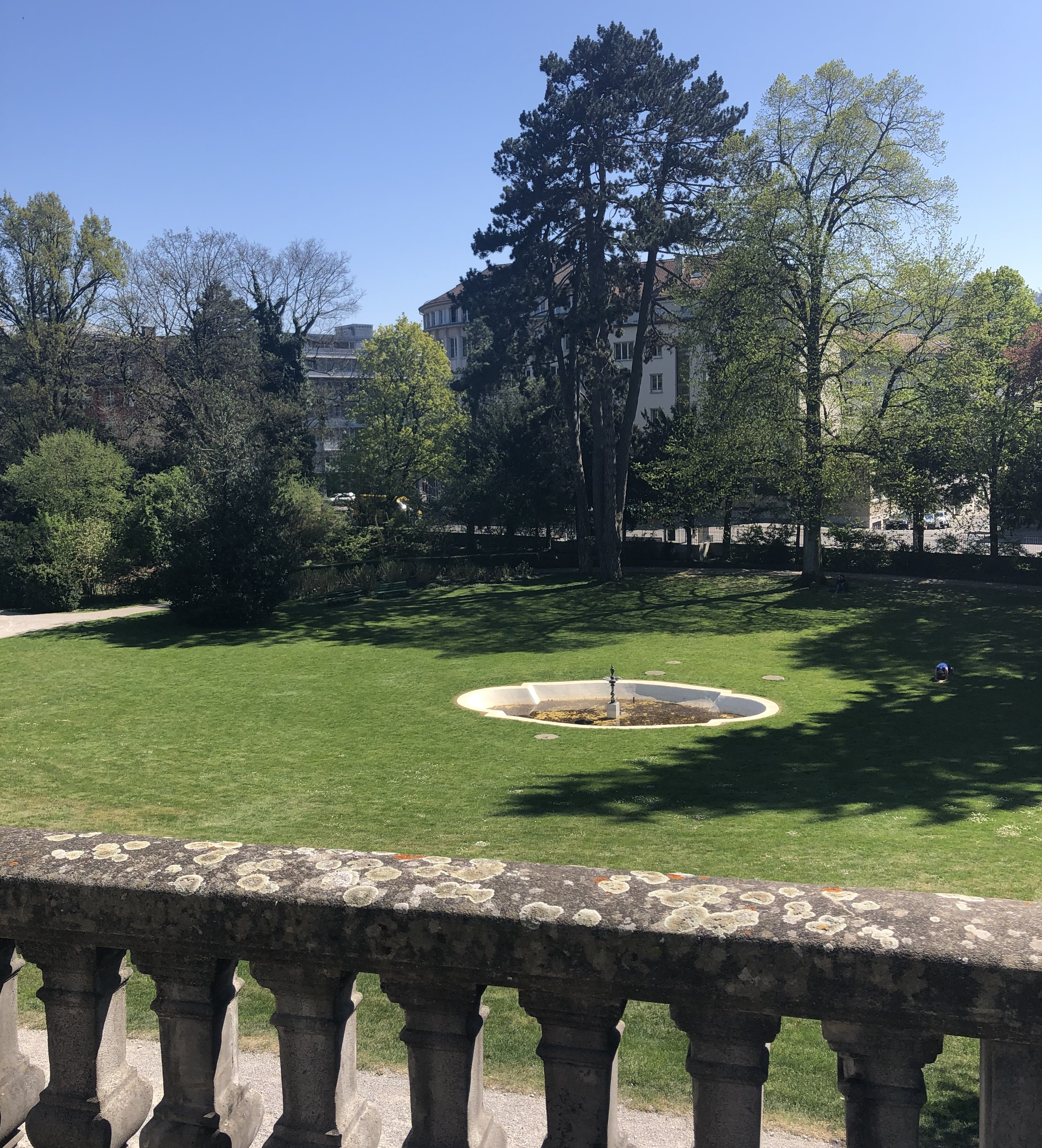 Villette Blick in den Kocherpark